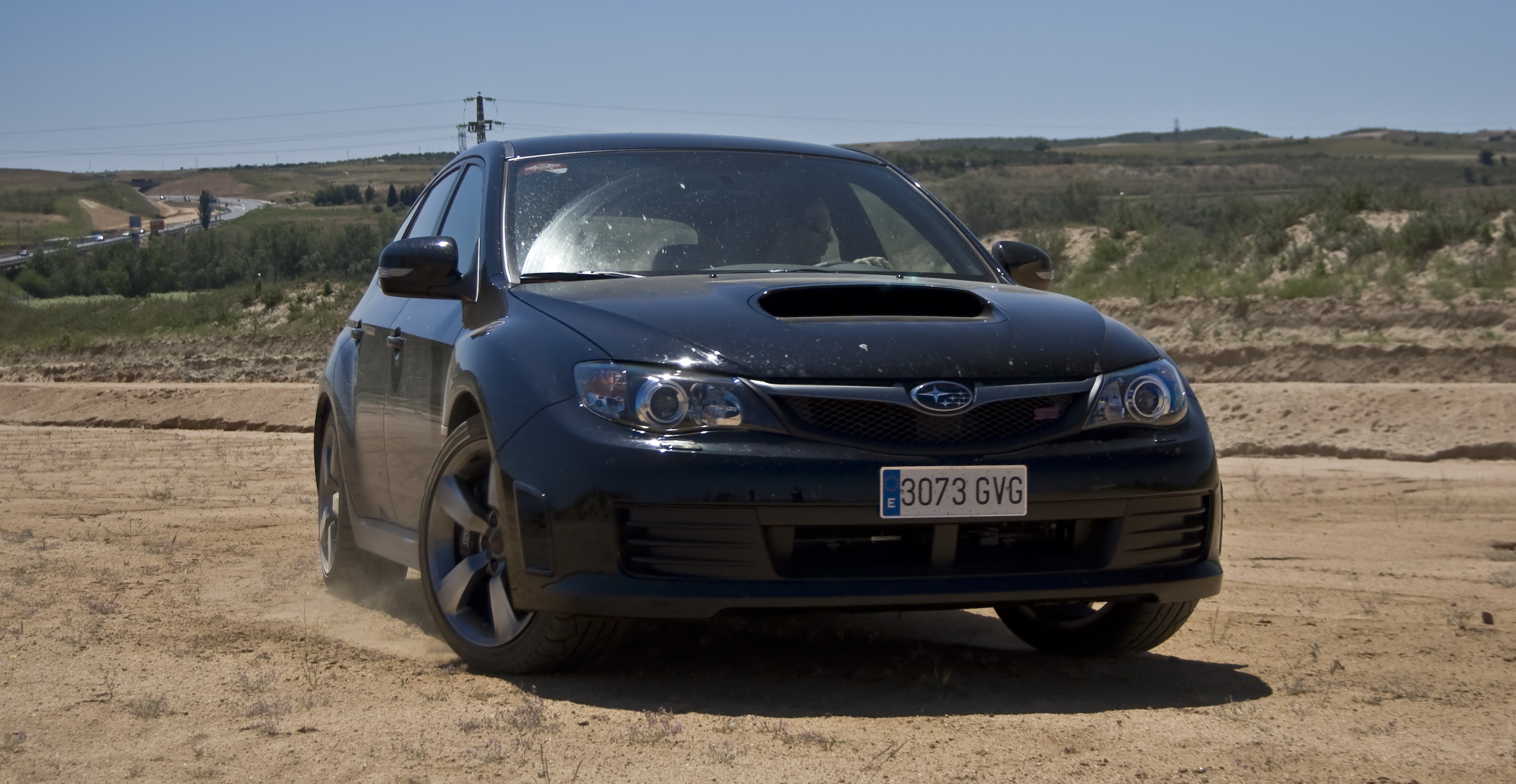 Subaru Impreza STI Prueba para Diariomotor